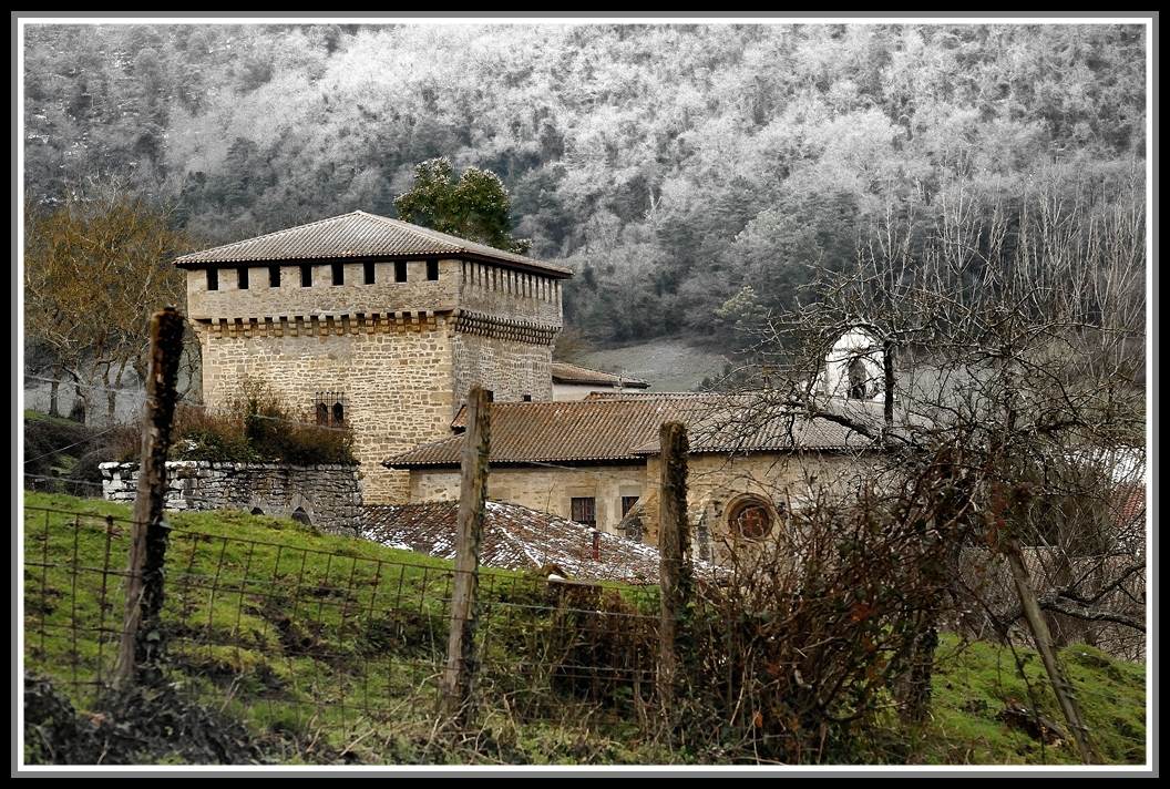 Kexaako (Aiara, Araba, Euskal Herria) ikuspegia, neguan.